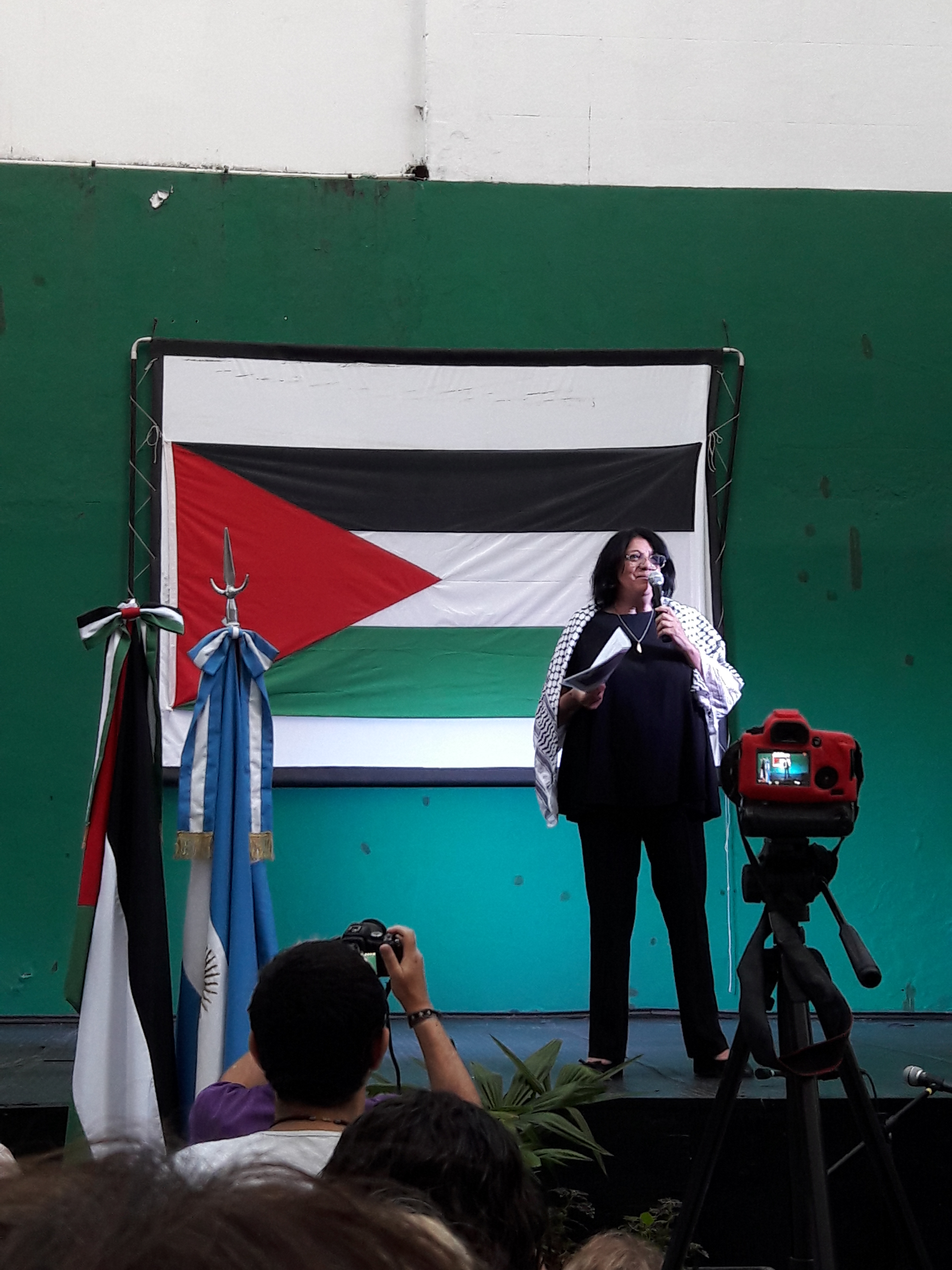 El sábado 1 de abril de 2017, la Embajada de Palestina en Buenos Aires realizó una celebración por el día de la Tierra Palestina, pariticipando la colectividad palestina y demás argentinos interesados.